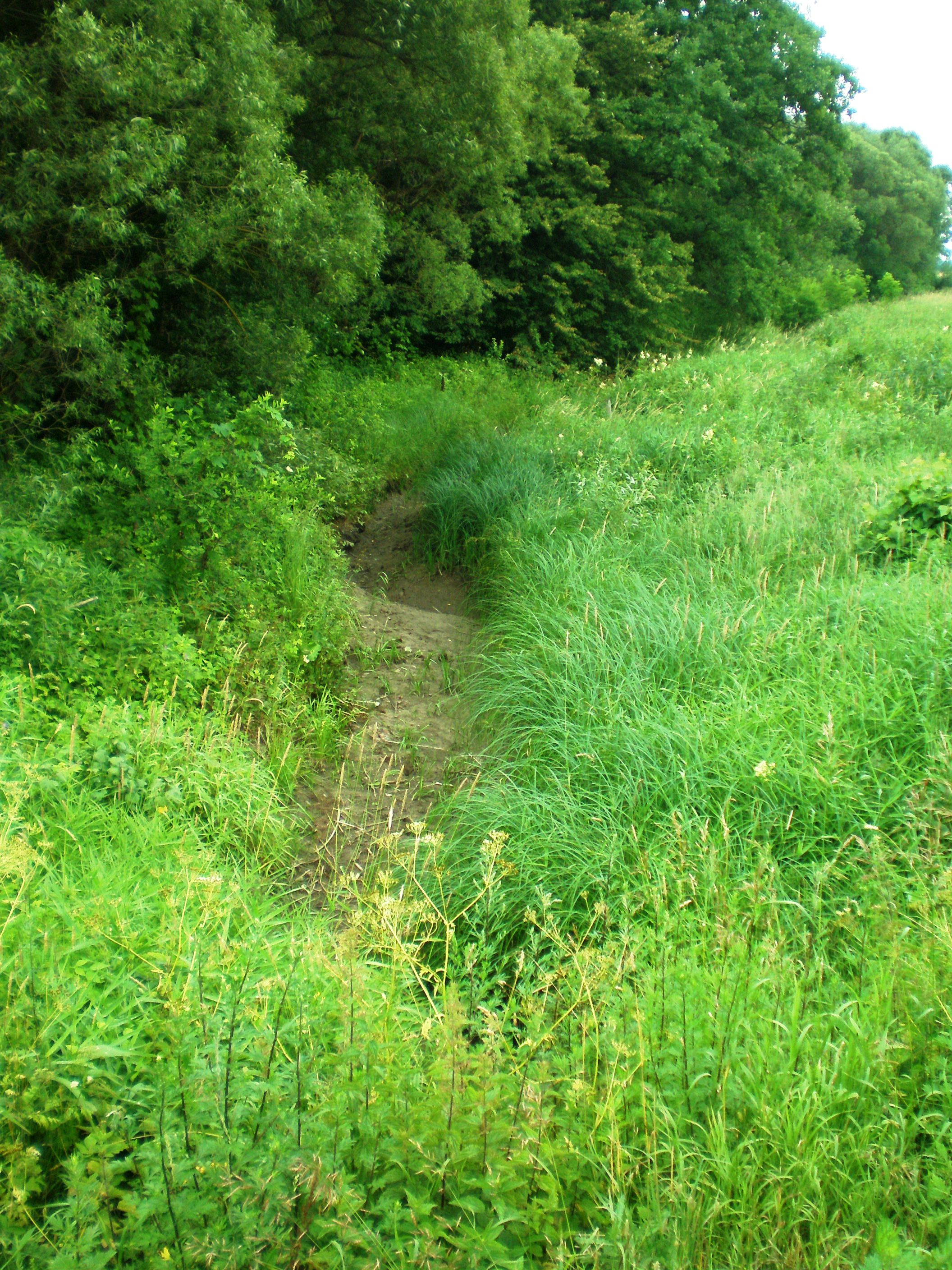 Putnupio upelis (jo sausa vaga) ties Prapuoleniais, Kėdainių raj.